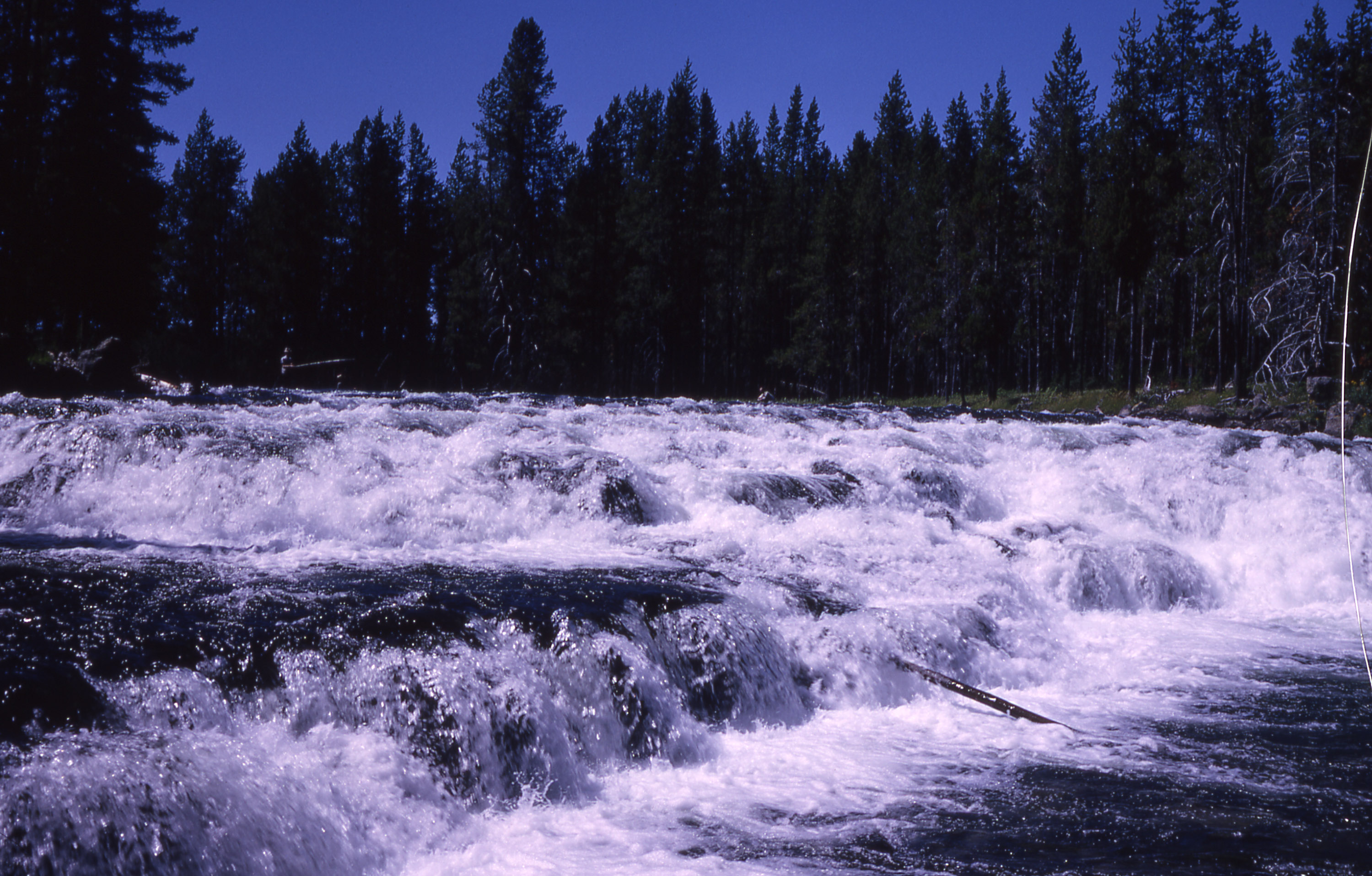 Bechler Falls, Bechler River, Yellowstone National Park, Wyoming